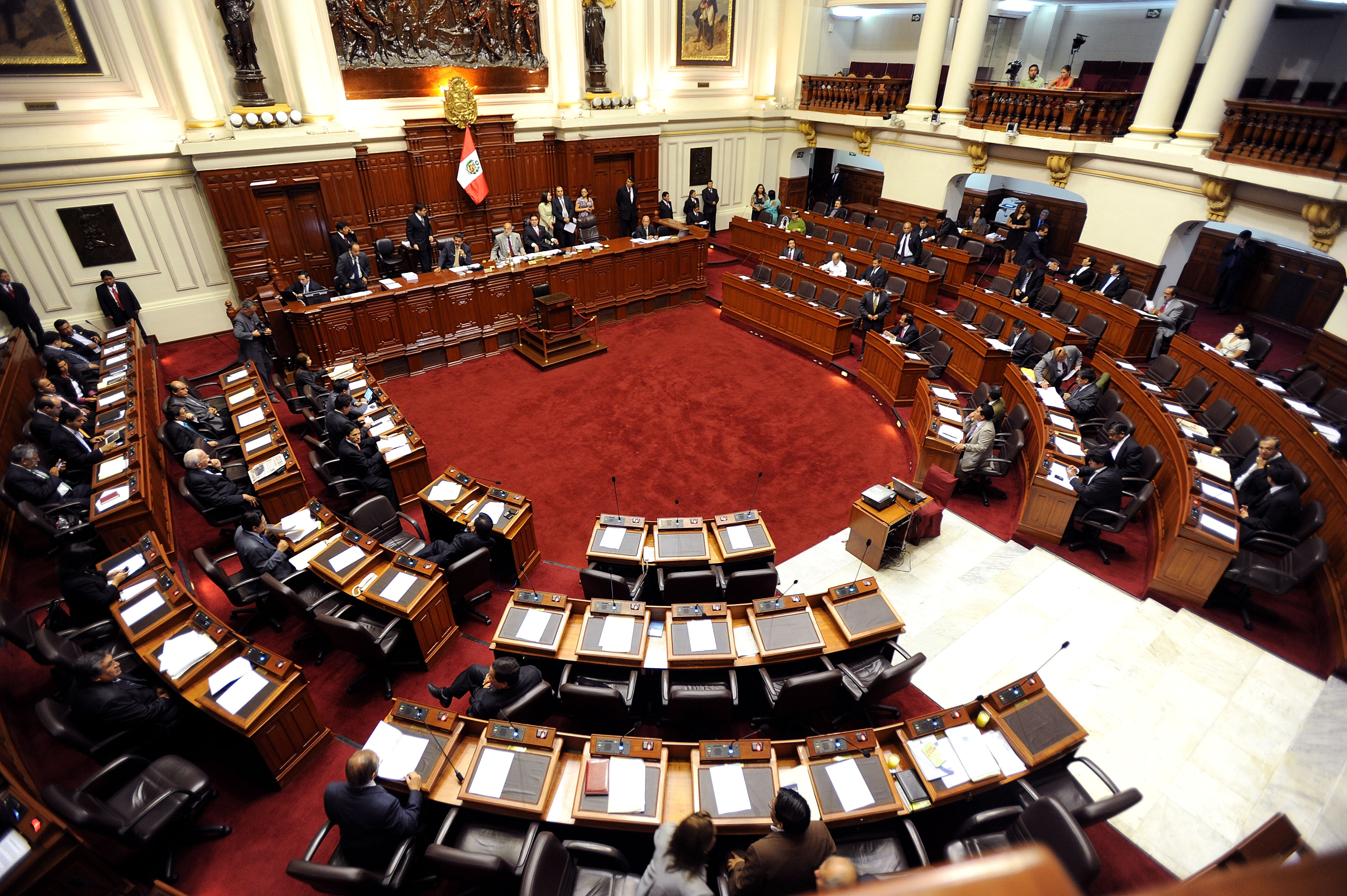 Terminó, a las 2 y 25 de la tarde, la presentación del ministro del Interior, Daniel Lozada Casapía, ante el Pleno del Congreso, en el cual expuso respecto de los recientes sucesos de violencia ocurridos en Madre de Dios. La sesión matutina fue suspendida a las 2 y 26 minutos de la tarde y la jornada vespertina comenzará a las 3 y 30.